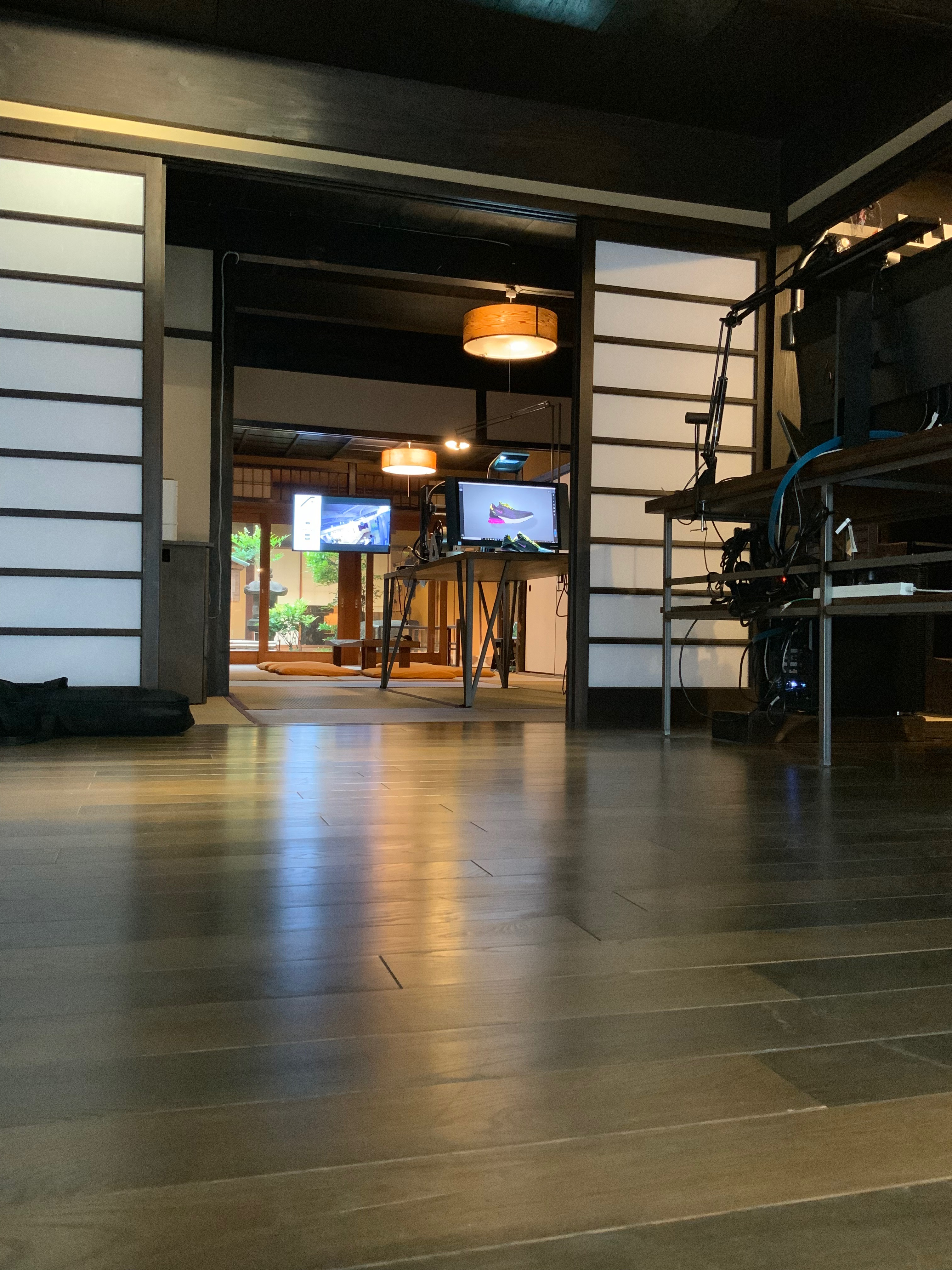 玄関から中庭を望む